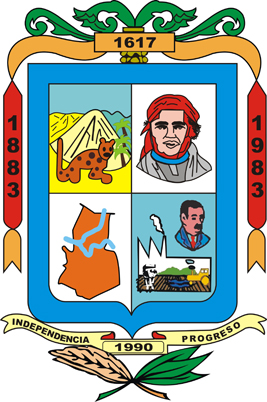 Escudo de apatzingan